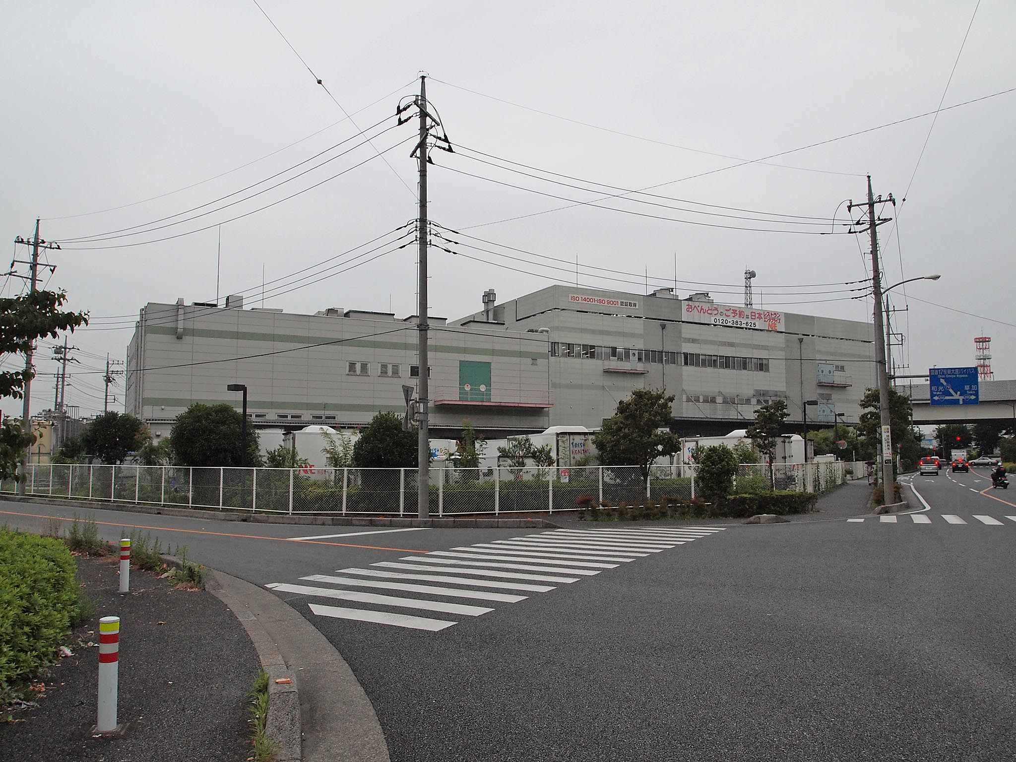 日本レストランエンタプライズ北戸田工場。CK本部（セントラルキッチン）が設置されていて、弁当・麺・パンなどを製造する。